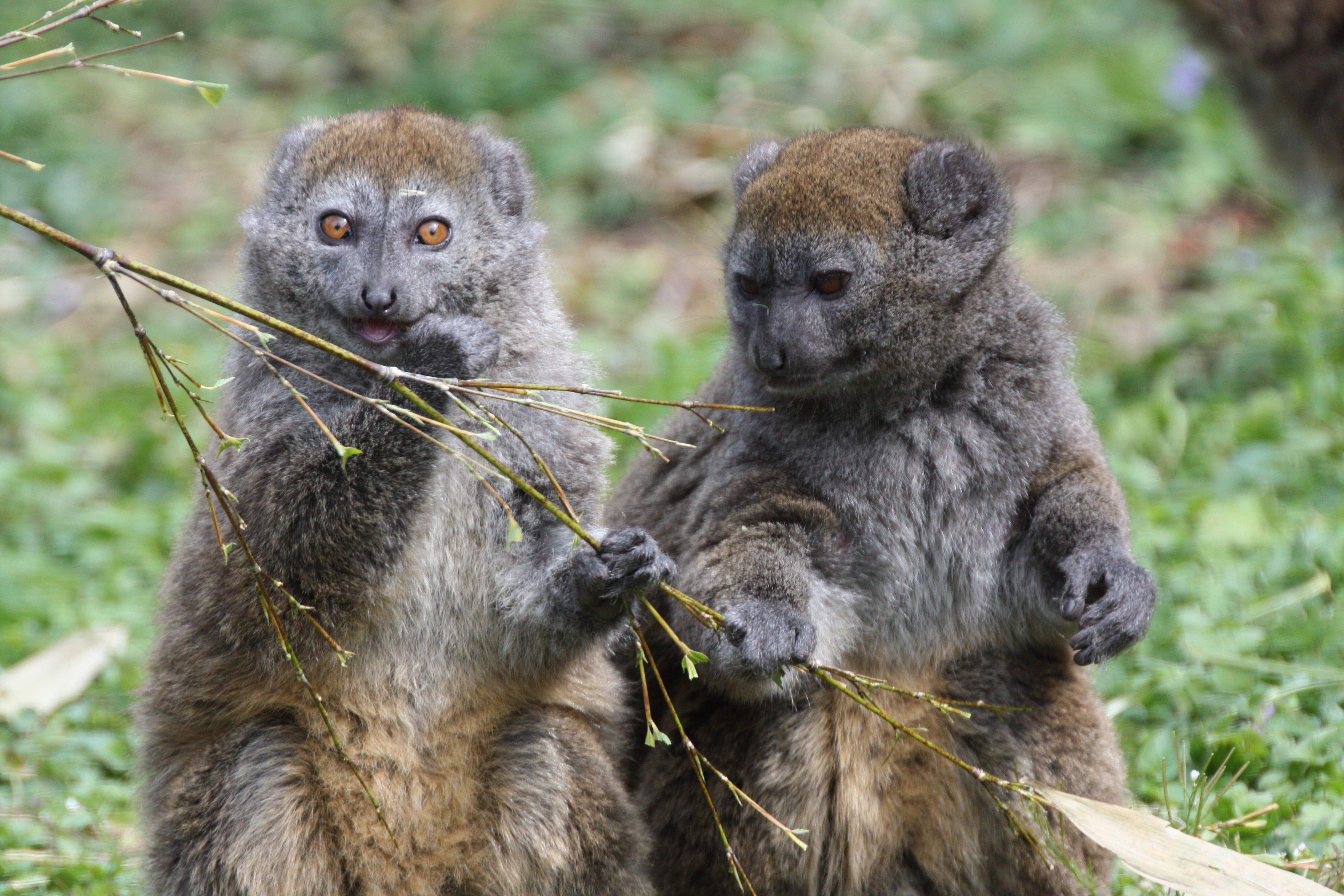 Alaotran Gentle Lemur